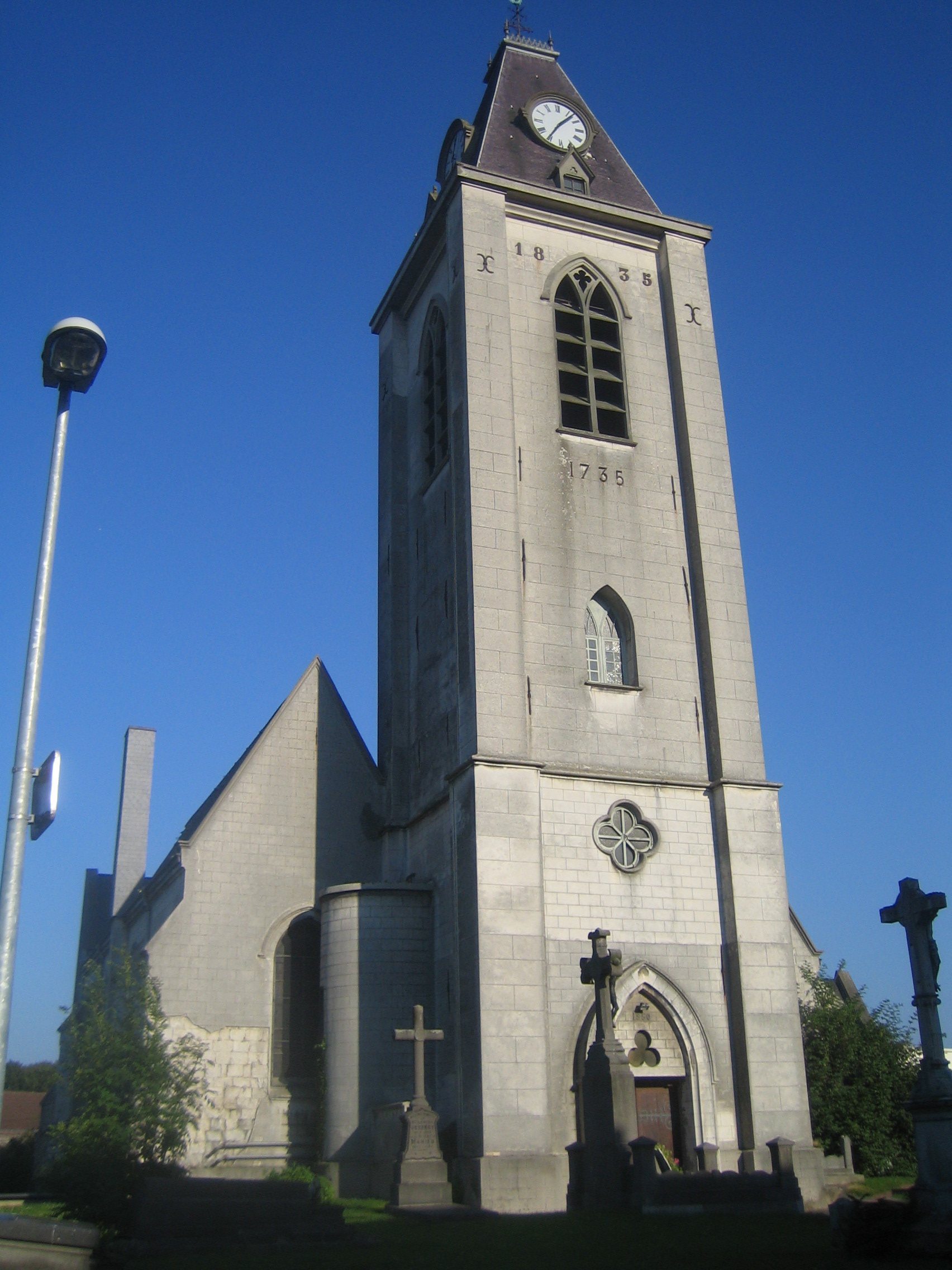 Eglise Saint-Sébastien d'Annappes, en 2007.